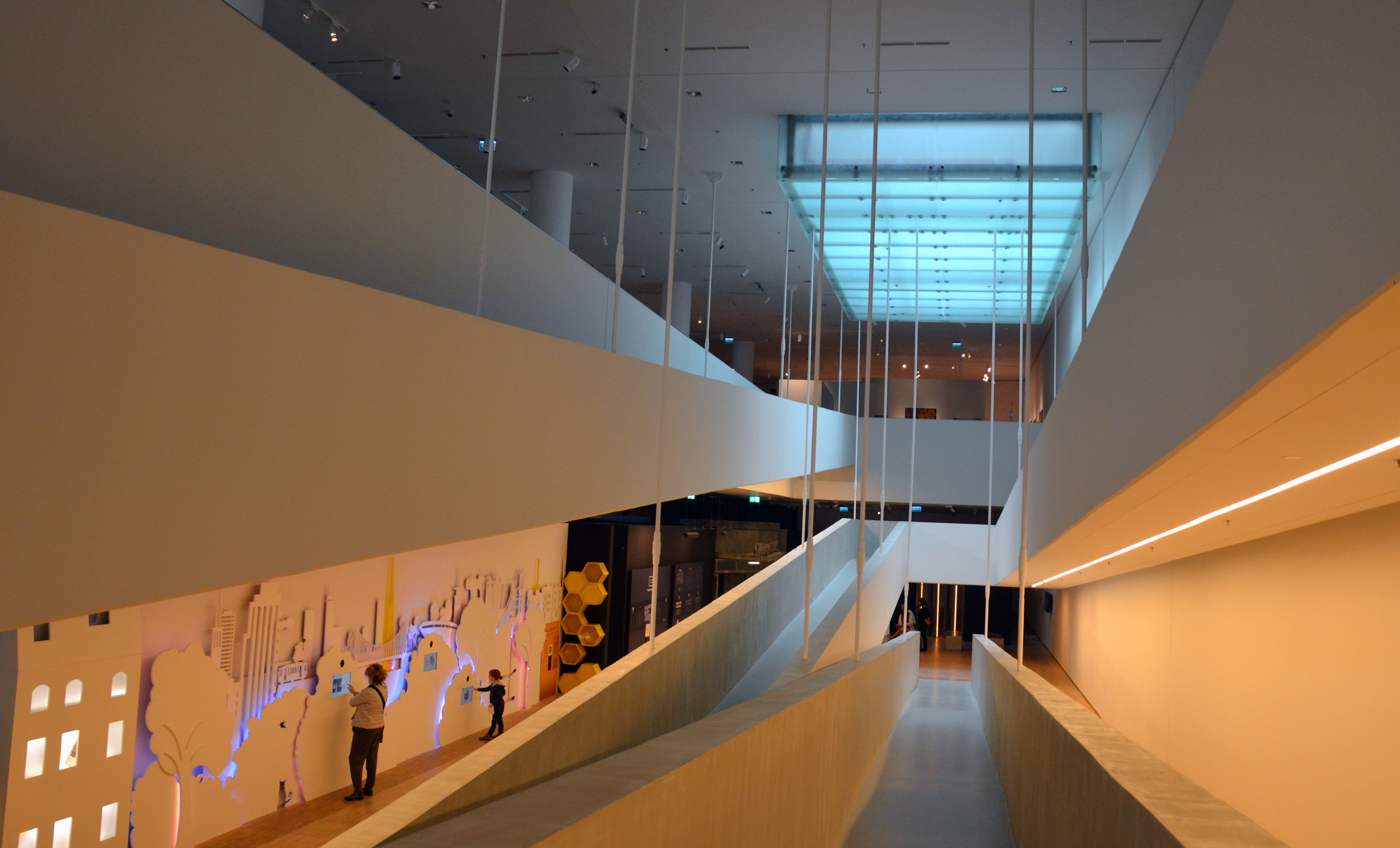 Schlesische Museum in Kattowitz